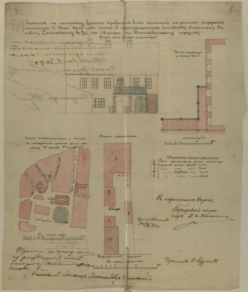 Беларуская (тарашкевіца): Менск (Miensk), вуліца Малая Бэрнардынская (vulica Małaja Bernardynskaja). Праект на рэканструкцыю мураванага жылога дома А. Смольскага.